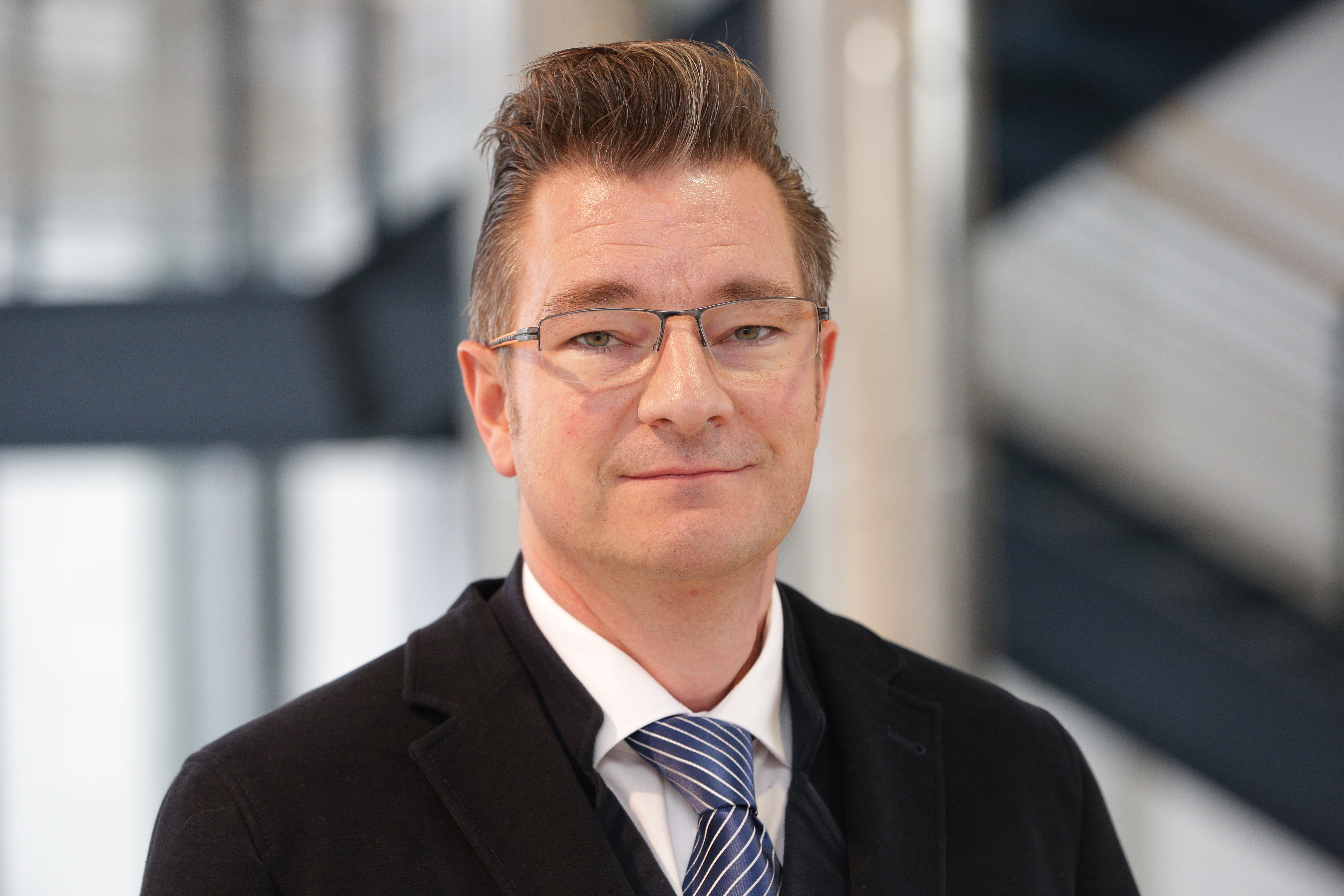 Photo of Prof. Dr.-Ing. Joachim Berlak